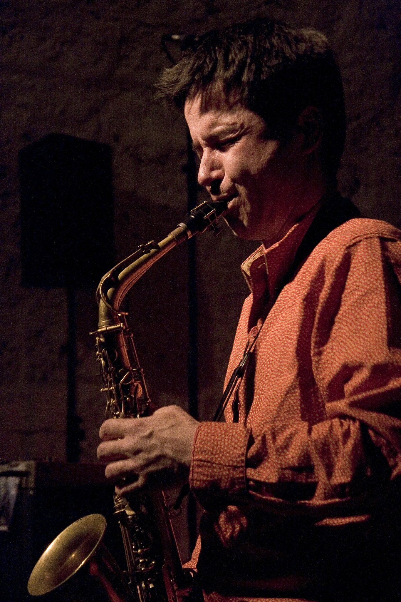 French jazz saxophonist Guillaume Orti performing at Les Voûtes, Paris. Solo alto saxophone.